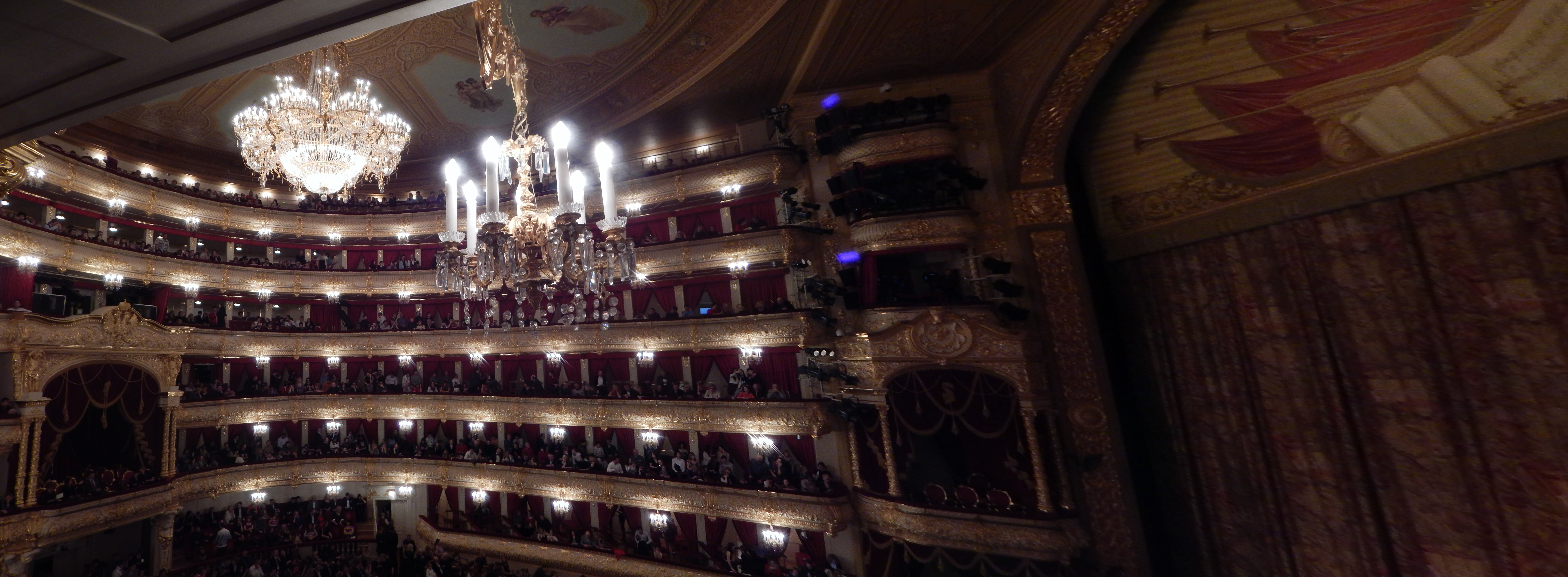 Панорама Исторической сцены Большого Театра в Москве, 31 декабря 2016. Фото сделано из ложи 2, первый ярус правой стороны.